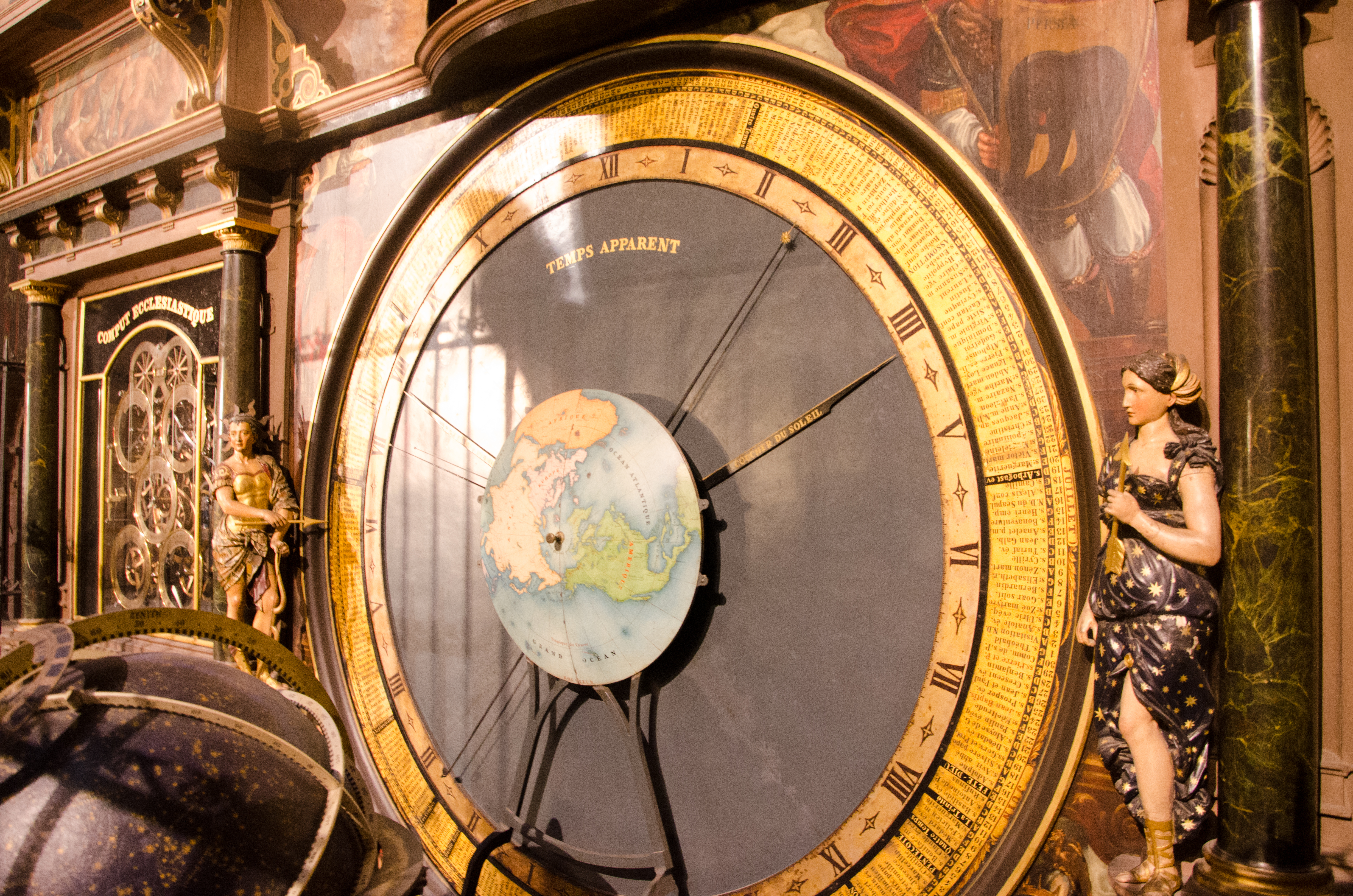 Au pied de l'immense horloge astronomique de la cathédrale de Strasbourg, se trouve quelques éléments intéressants que voici.